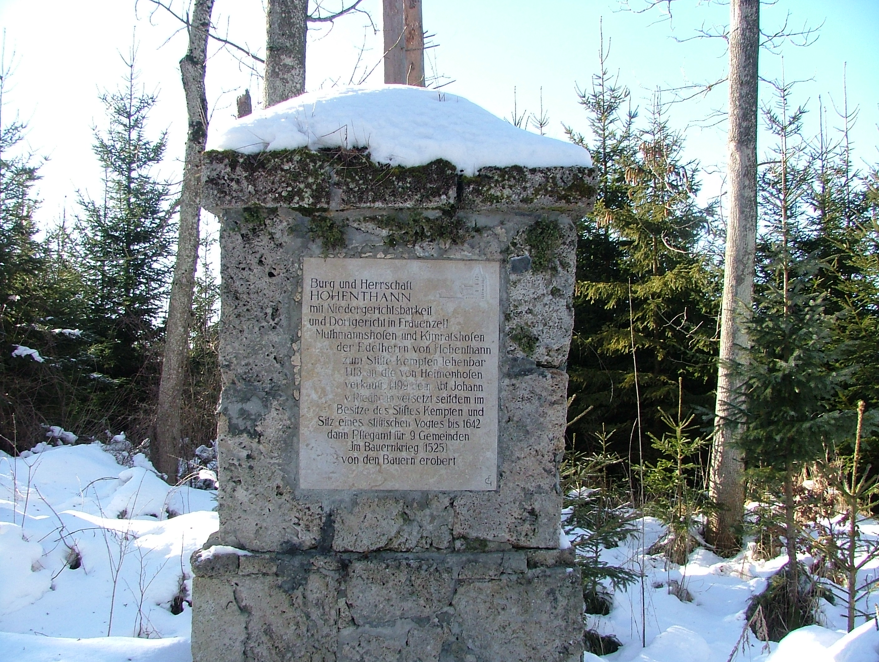 Burgruine Hohentann, Kimratshofen. Denkmal aus den alten Tuffsteinen